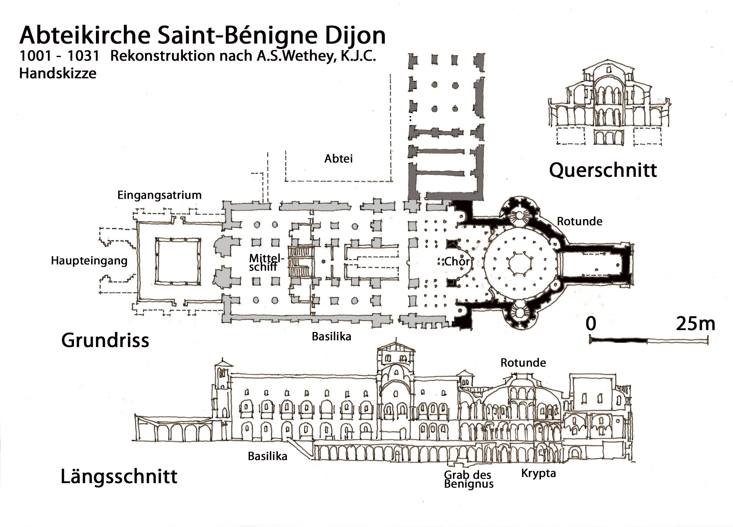 Abtedikirche S.t-Bénigne,Dijon,1001-1031Rekonstruktion. Handskizze